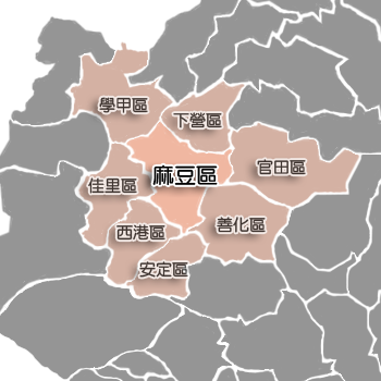 麻豆區相對位置